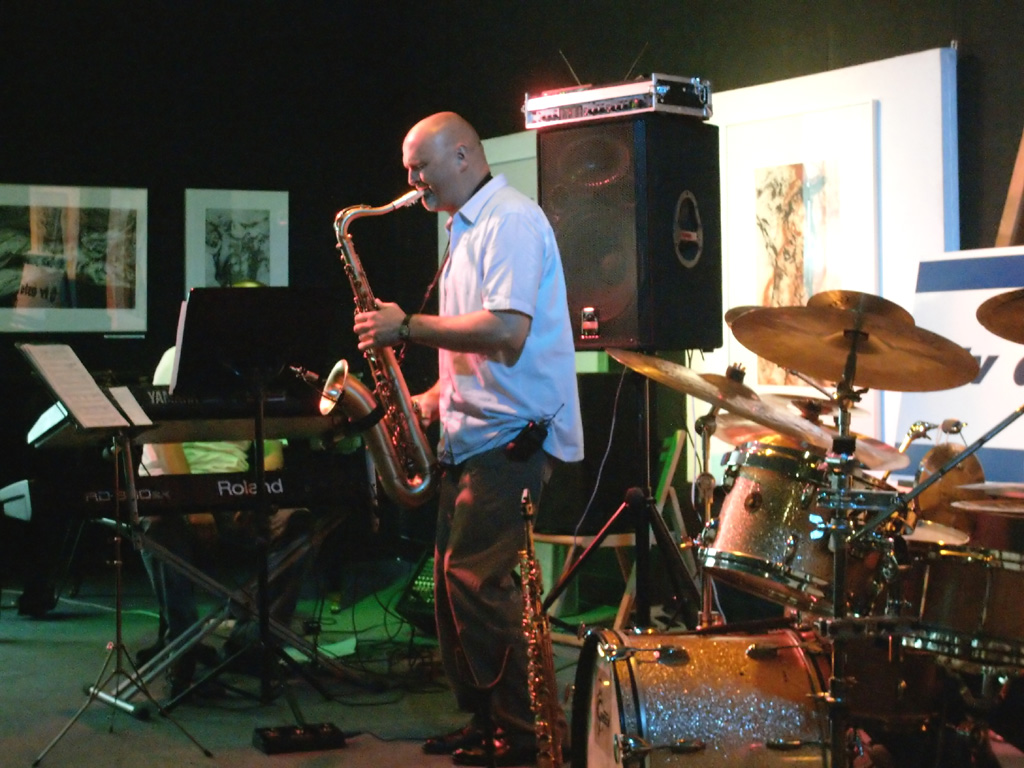 Adam Wendt in concert with Adam Wendt Power Set, Piła 2007